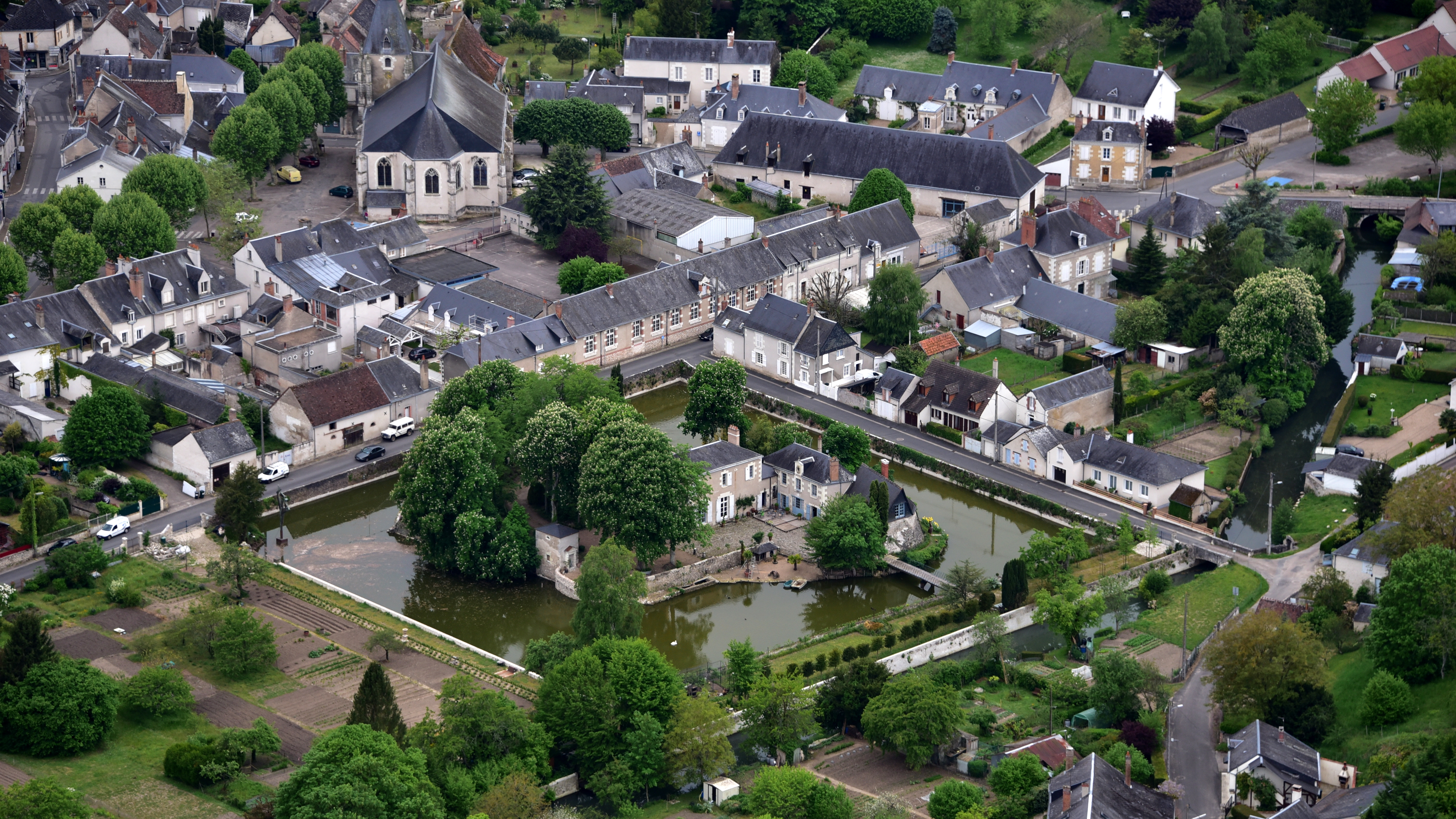 Onzain, Rue de l`Ecrevissière, Luftaufnahme (2016)